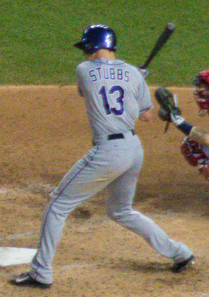 Drew Stubbs